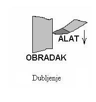 Vertical planer nmachine principle